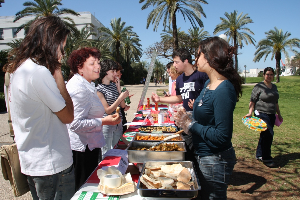 שני צמחוני באוני' תל אביב 2010 2